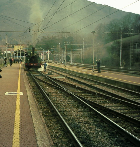 Locomotiva a vapore presso il primo binario della Stazione di Canzo-Asso, a Canzo.